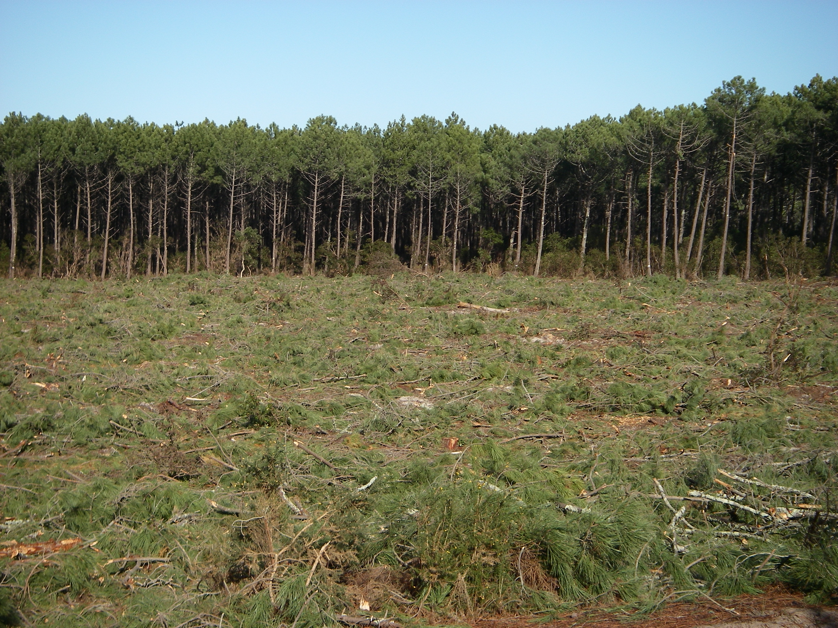 Coupe rase dans la forêt des Landes